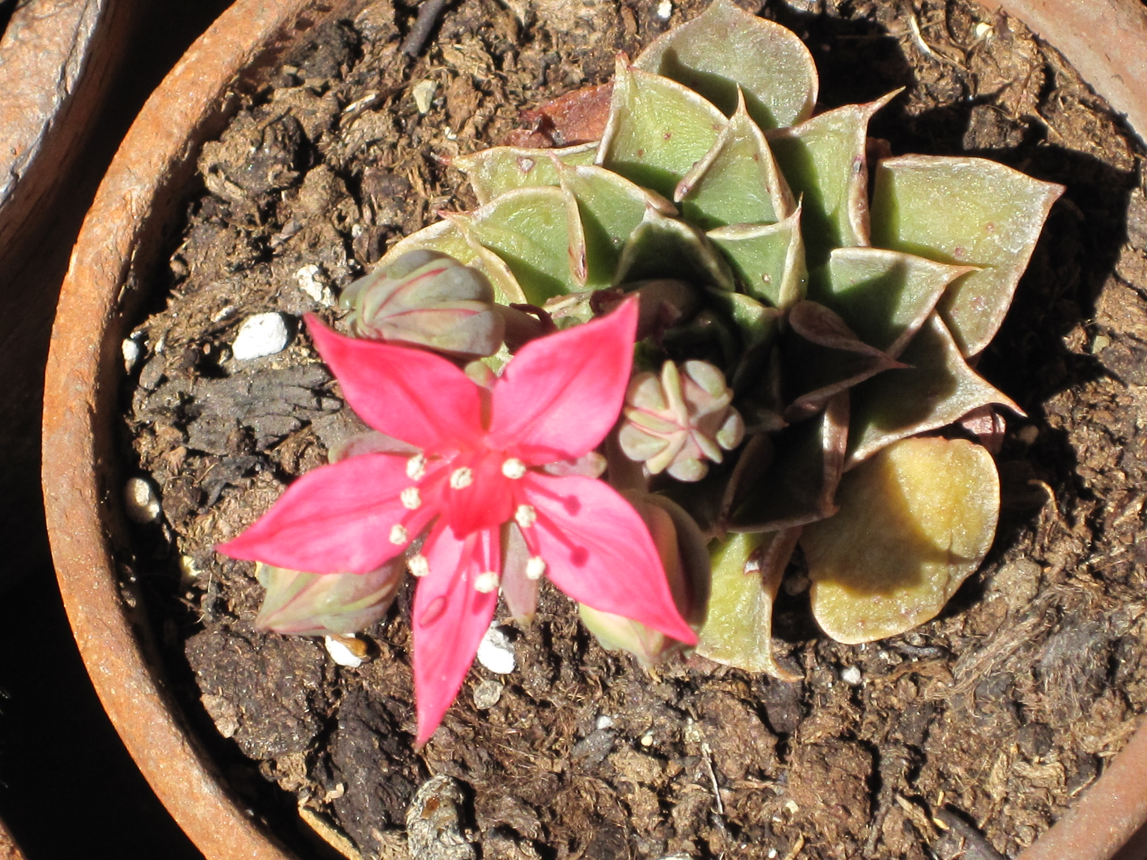 Graptopetalum bellum in fiore